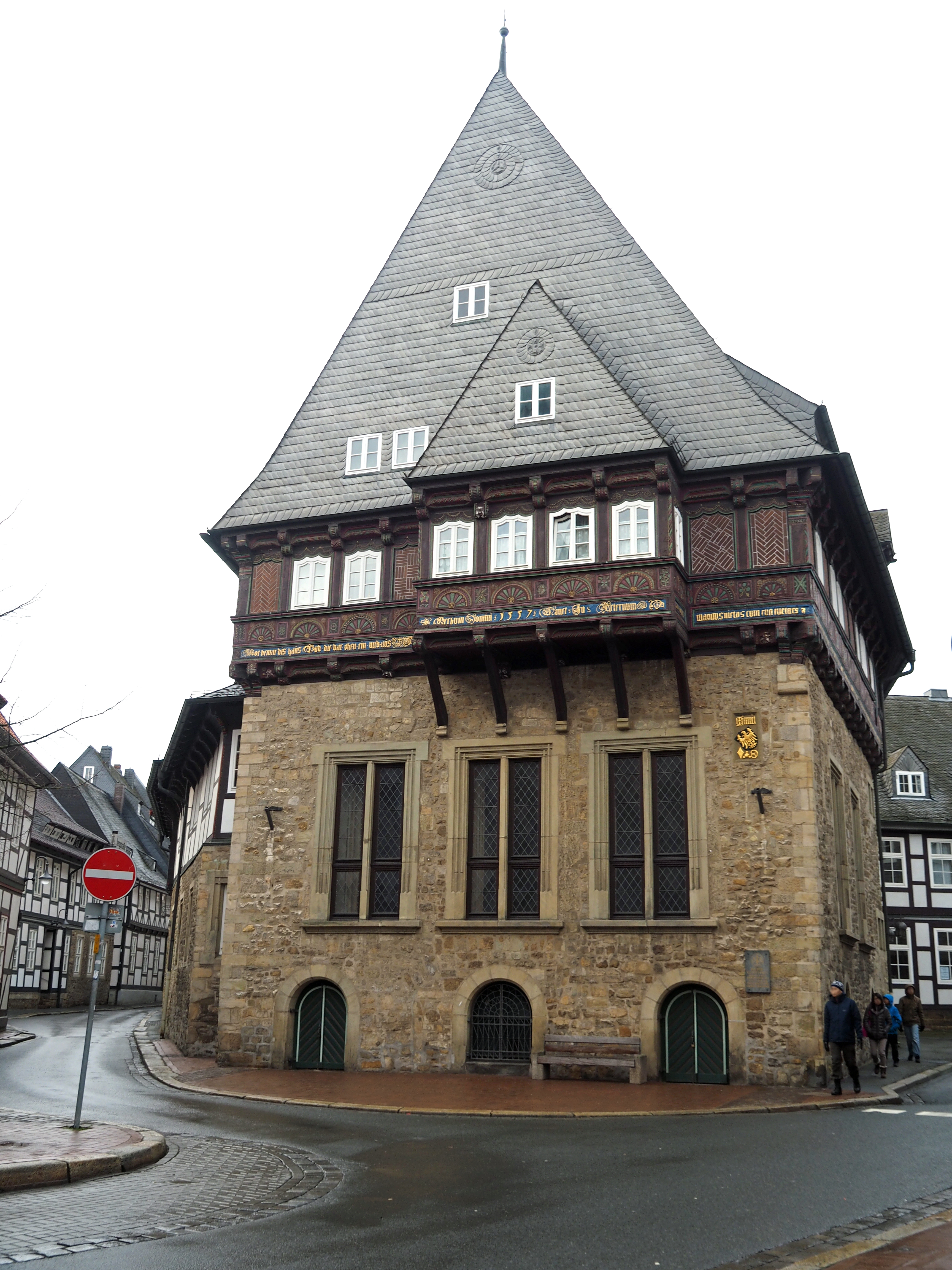 Bäckergildehaus von 1501, Obergeschoss von 1557, Sitz der Industrie- Und Handelskammer in Goslar